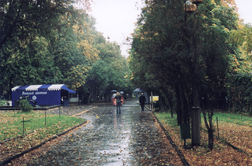 Саратов. Парк Липки.